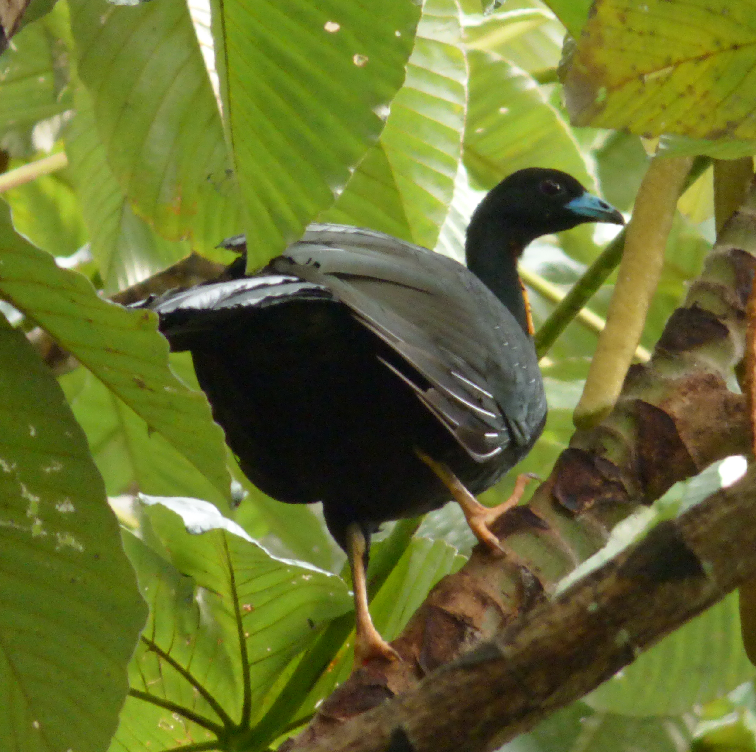 Aburria aburri (Pava negra) (4)